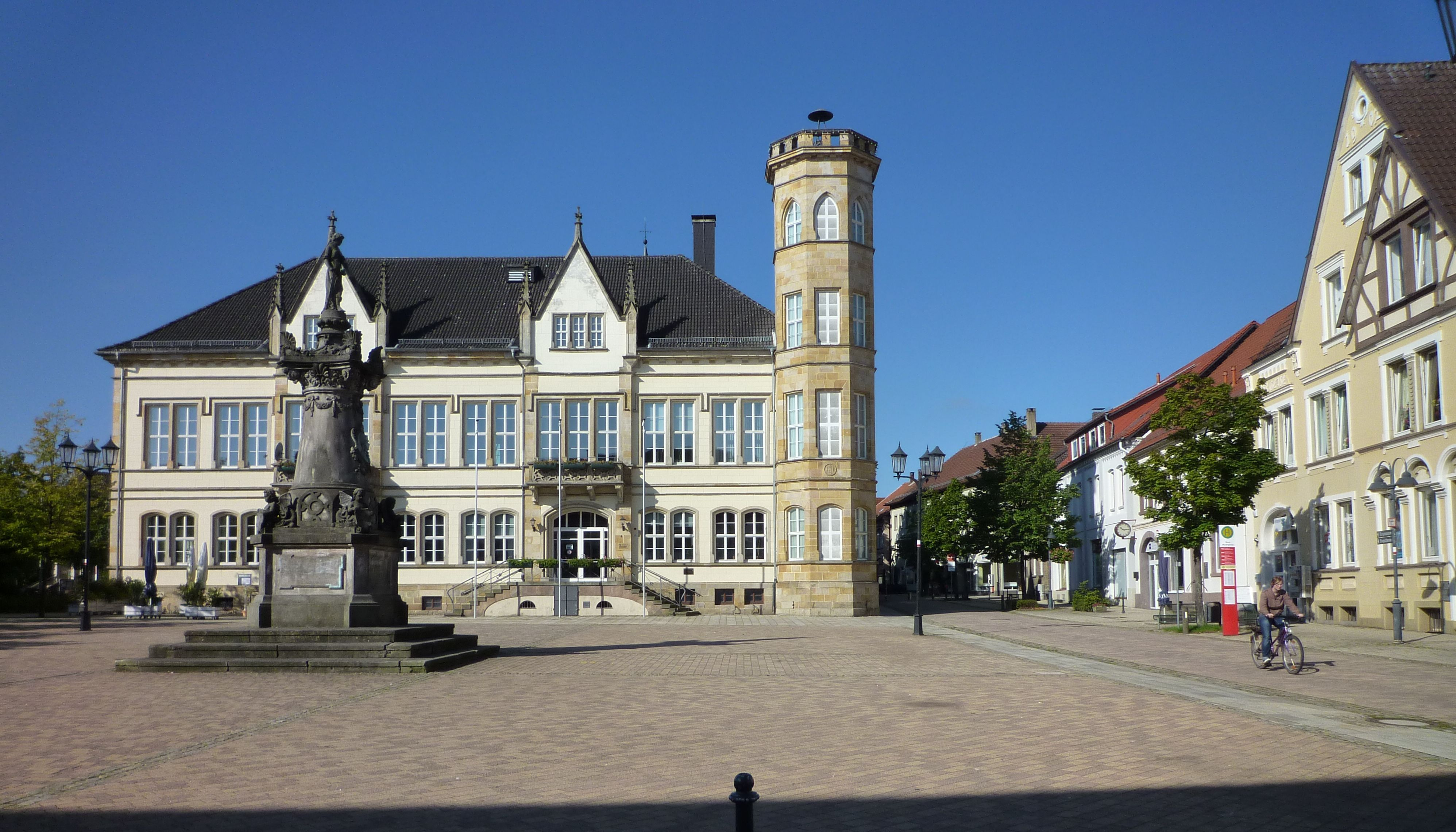 Horn-Bad Meinberg - Rathaus